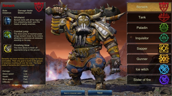 Интерфейс создания персонажа в игре Panzar